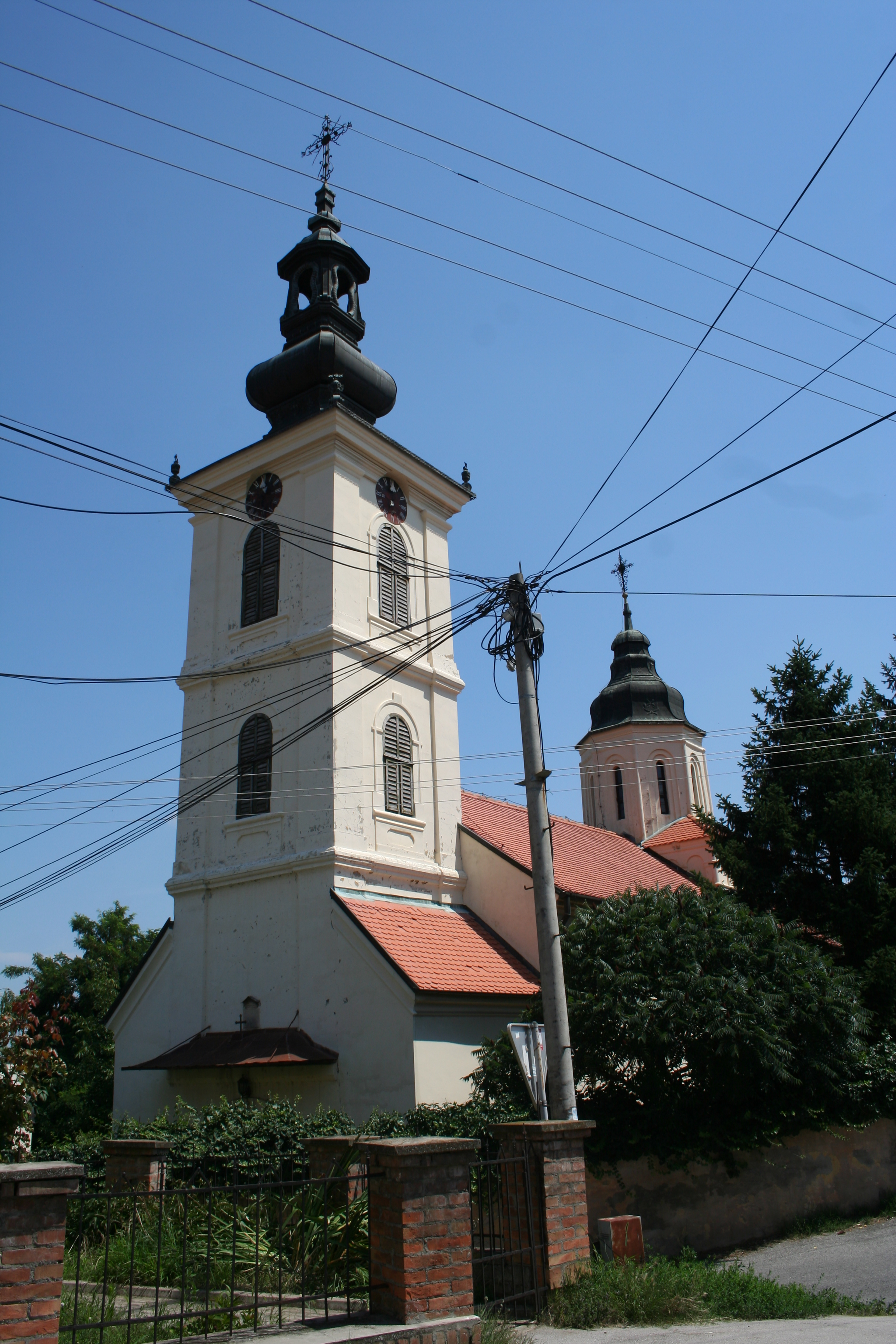 Gornja crkva, Sremski Karlovci